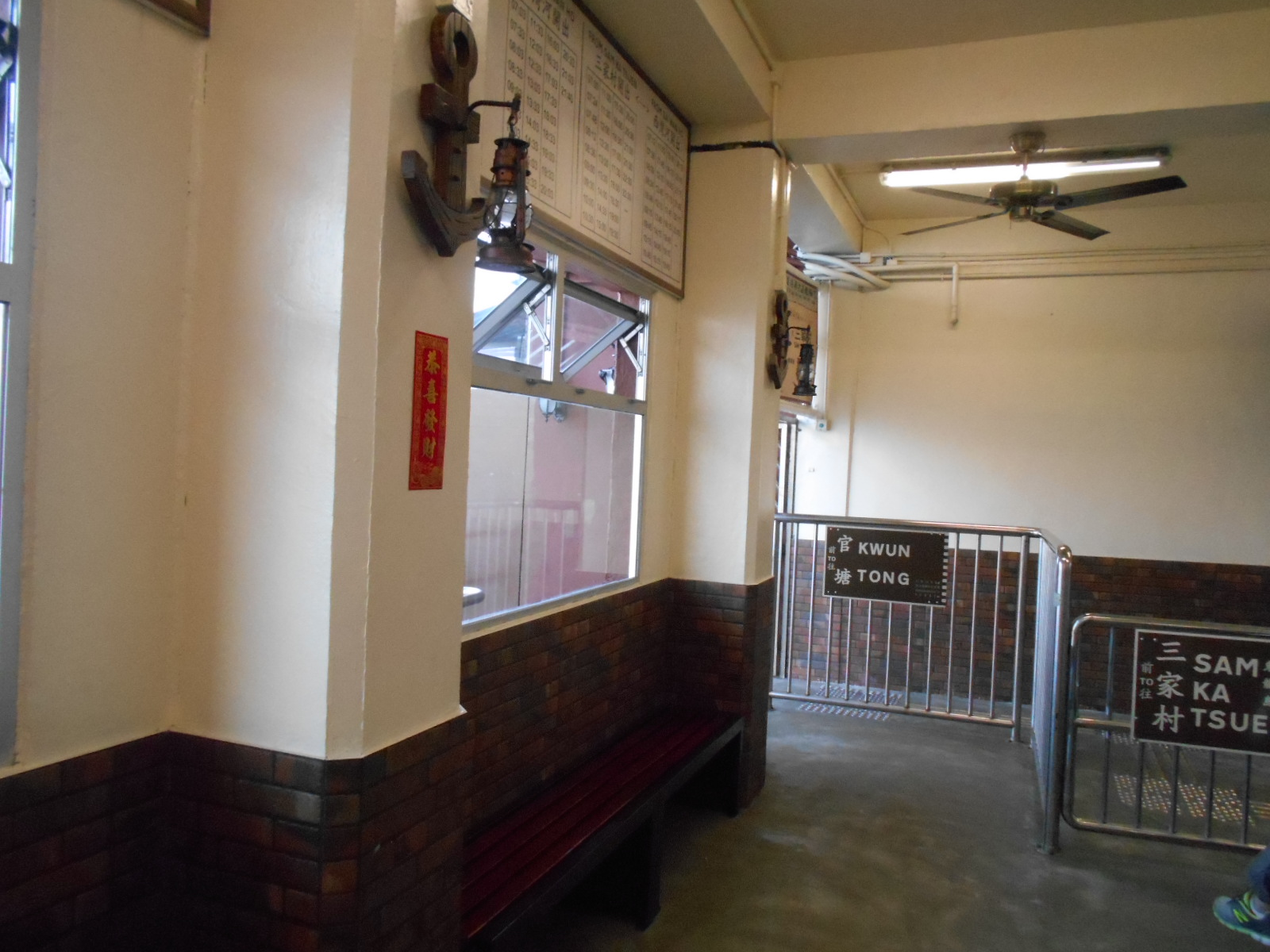 中文（香港）: 翻新後的西灣河碼頭的內部(2017年1月)